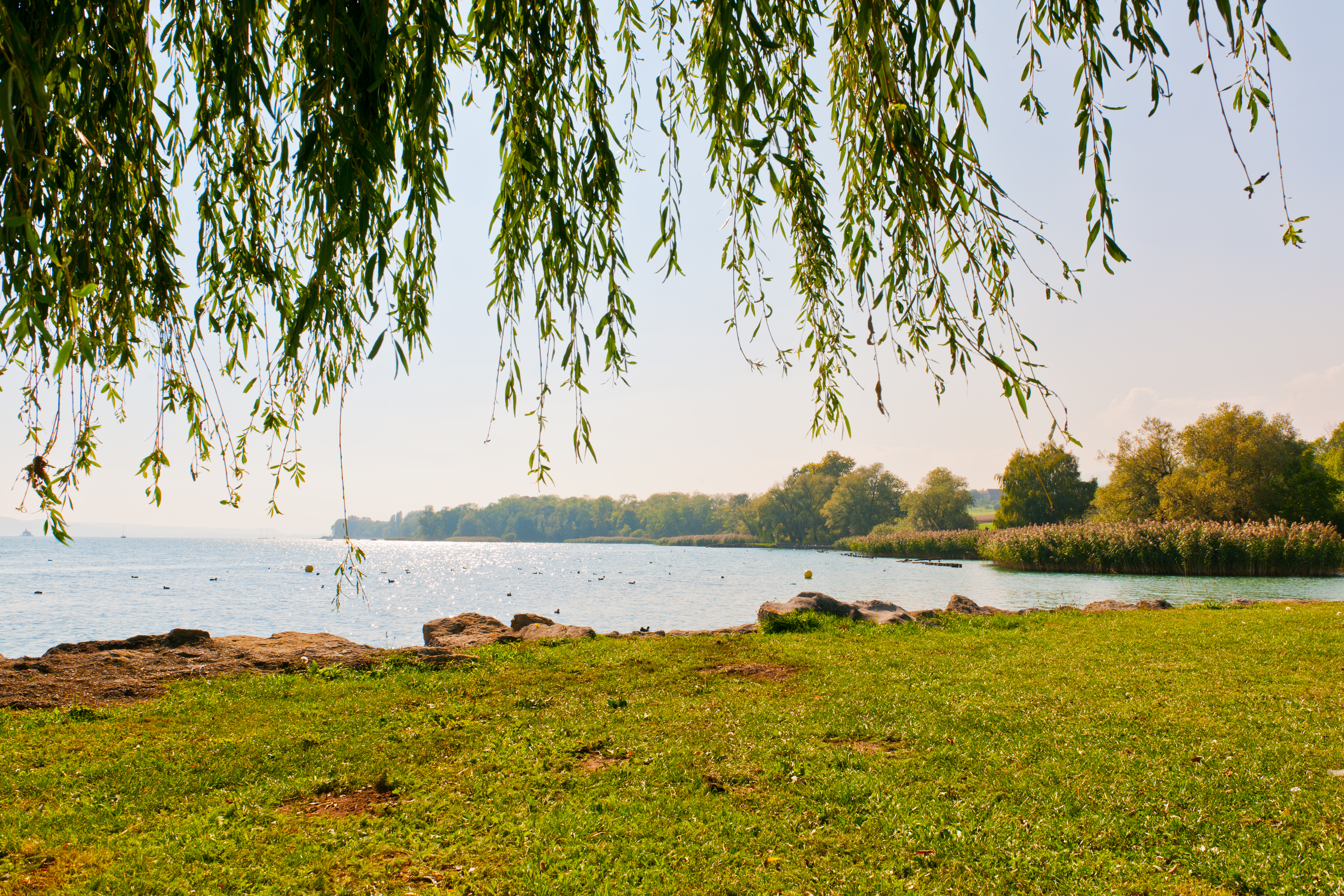 Sous-Colachoz, la Baie, station lacustre néolithique / de l'âge du bronze